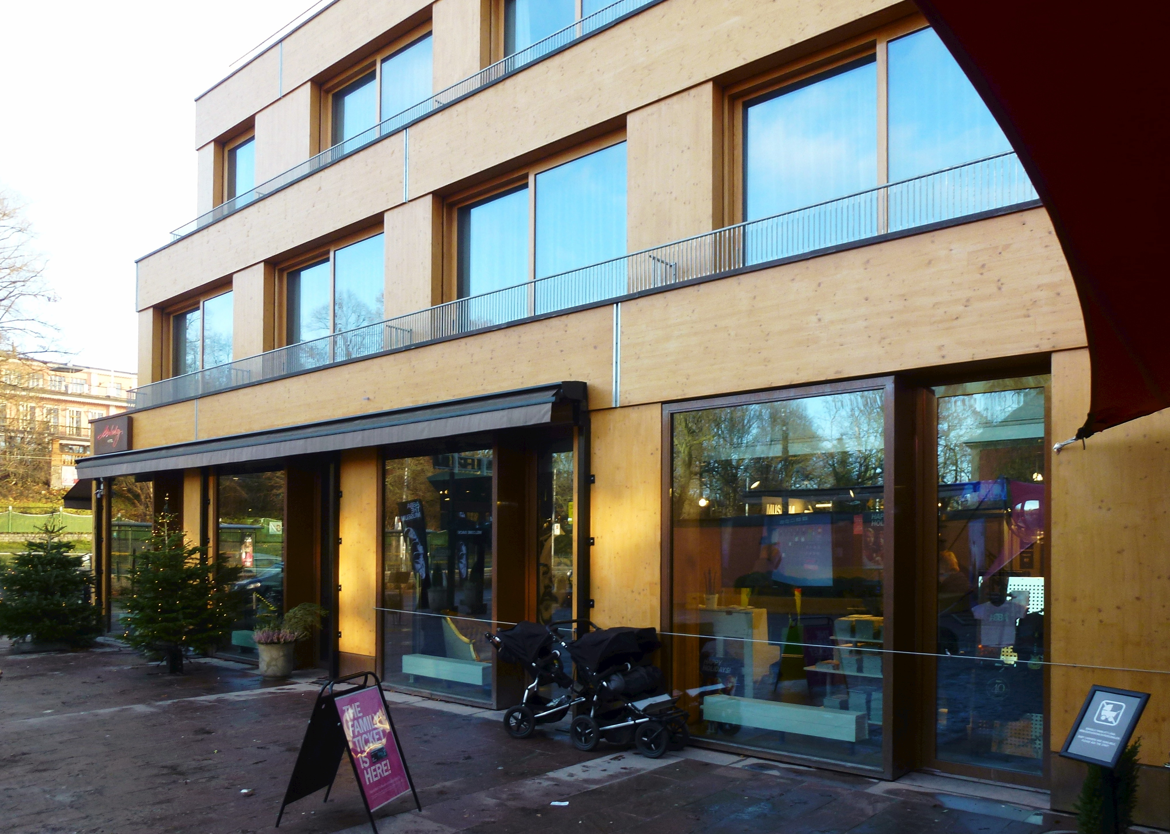 ABBA Museum och Melody Hotel, fasaddetalj